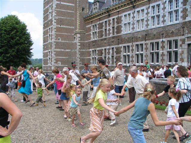 Rei dansen tijdens de bronk.